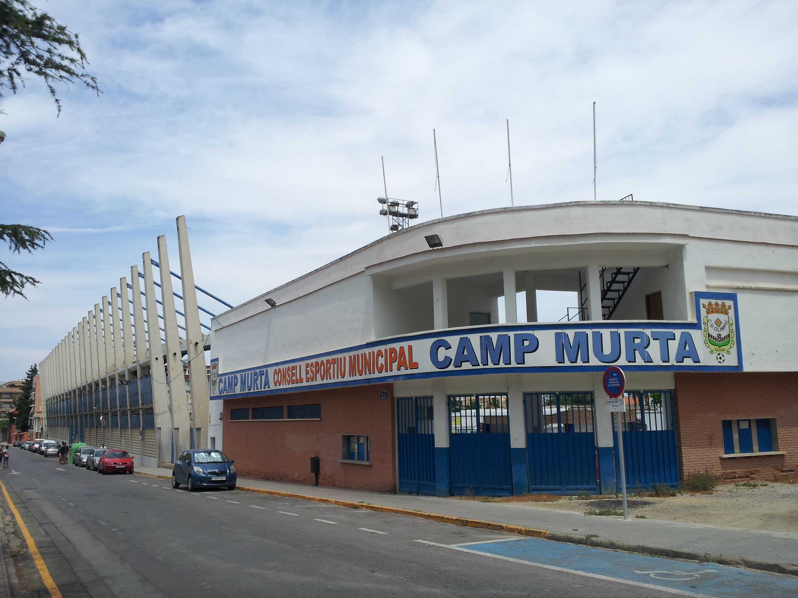 Estadi de l'Olímpic de Xàtiva